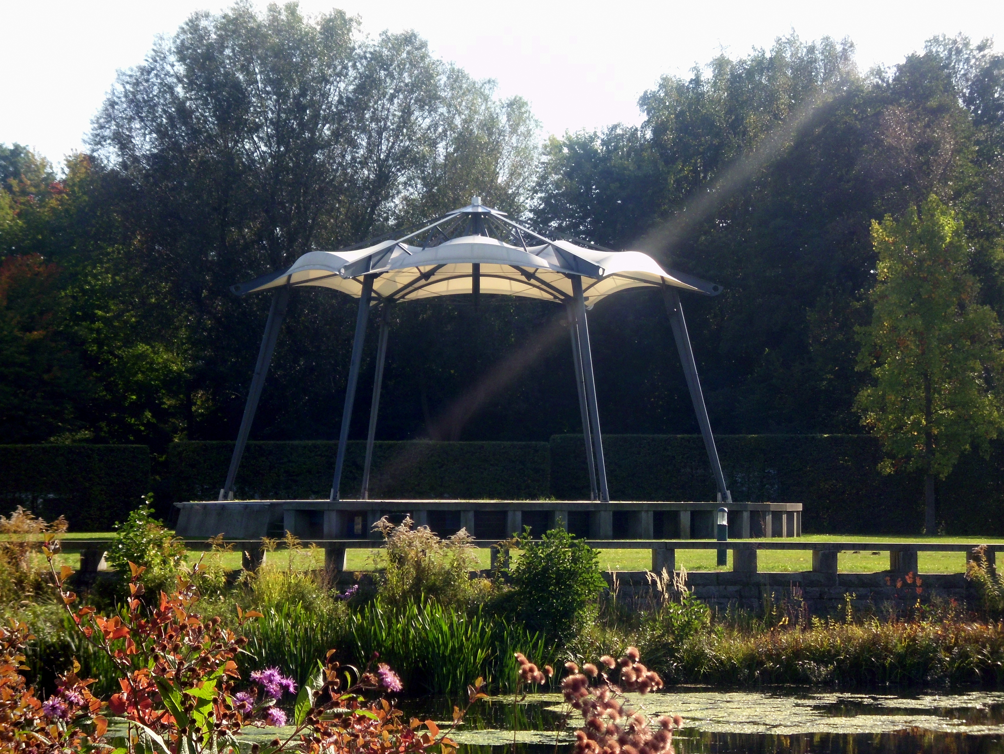 Spreeauenpark Cottbus mit Blick auf den Veranstaltungspavillion